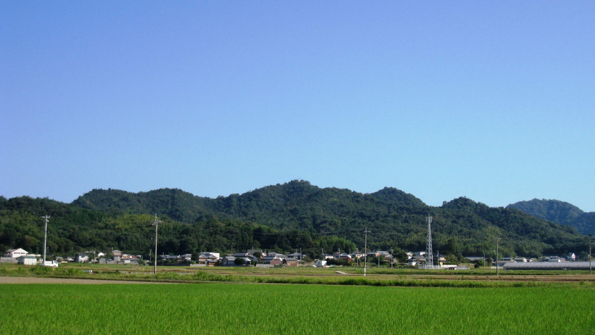 香川県さぬき市の大谷山の全景。山頂の北峰には全テレビ局が志度テレビ中継局を置いている。